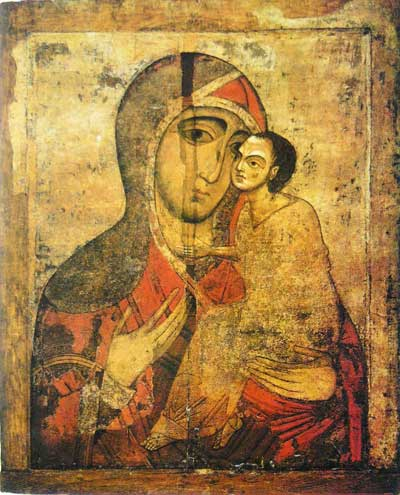 Богоматерь Умиление Старорусская (Eleusa of Staraya Russa)